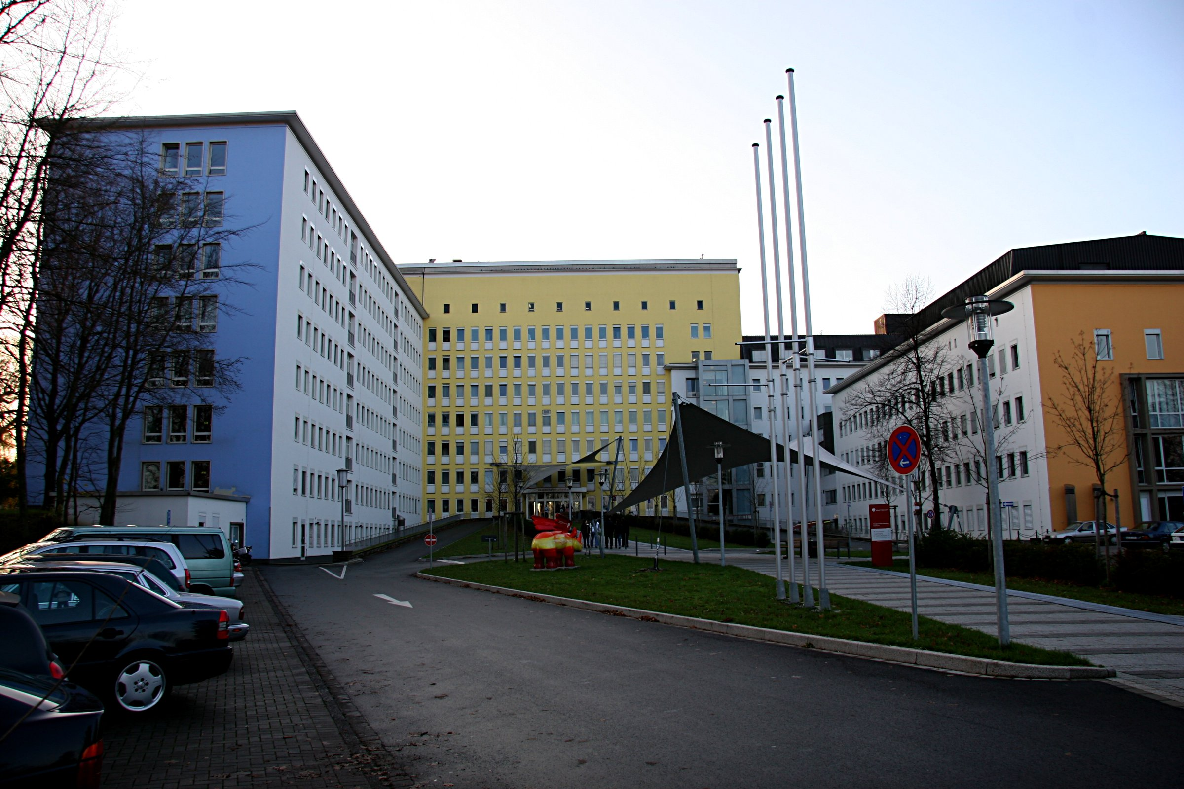 Haupteingang des Knappschaftskrankenhauses Dortmund. Dortmund, Nordrhein-Westfalen, Deutschland.